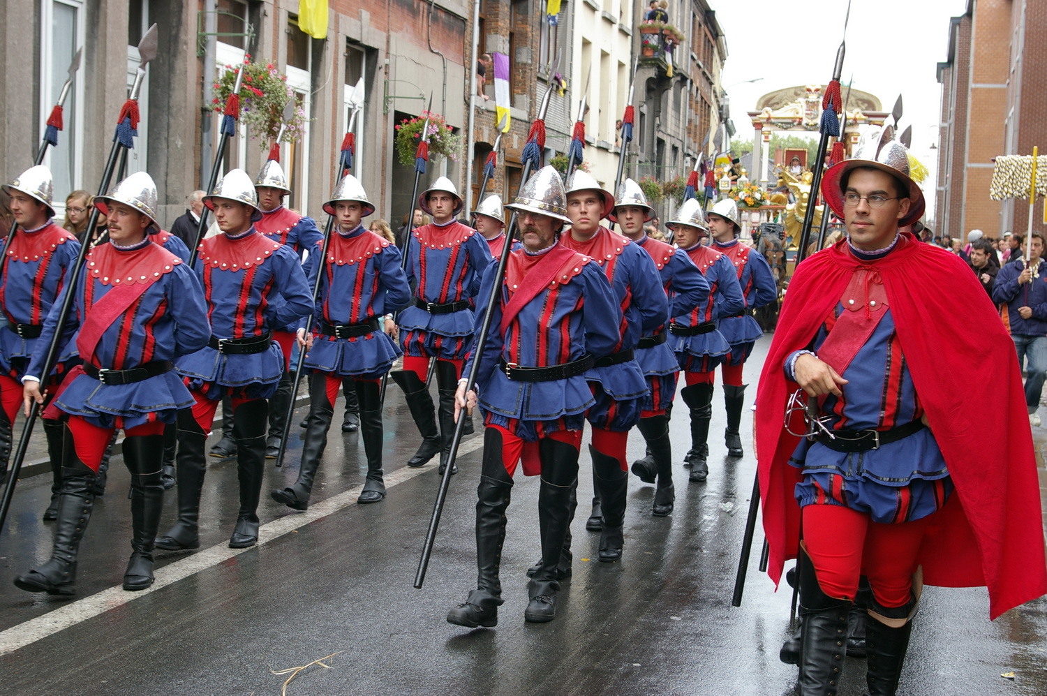 Les hommes d'armes, ducasse d'Ath 2008